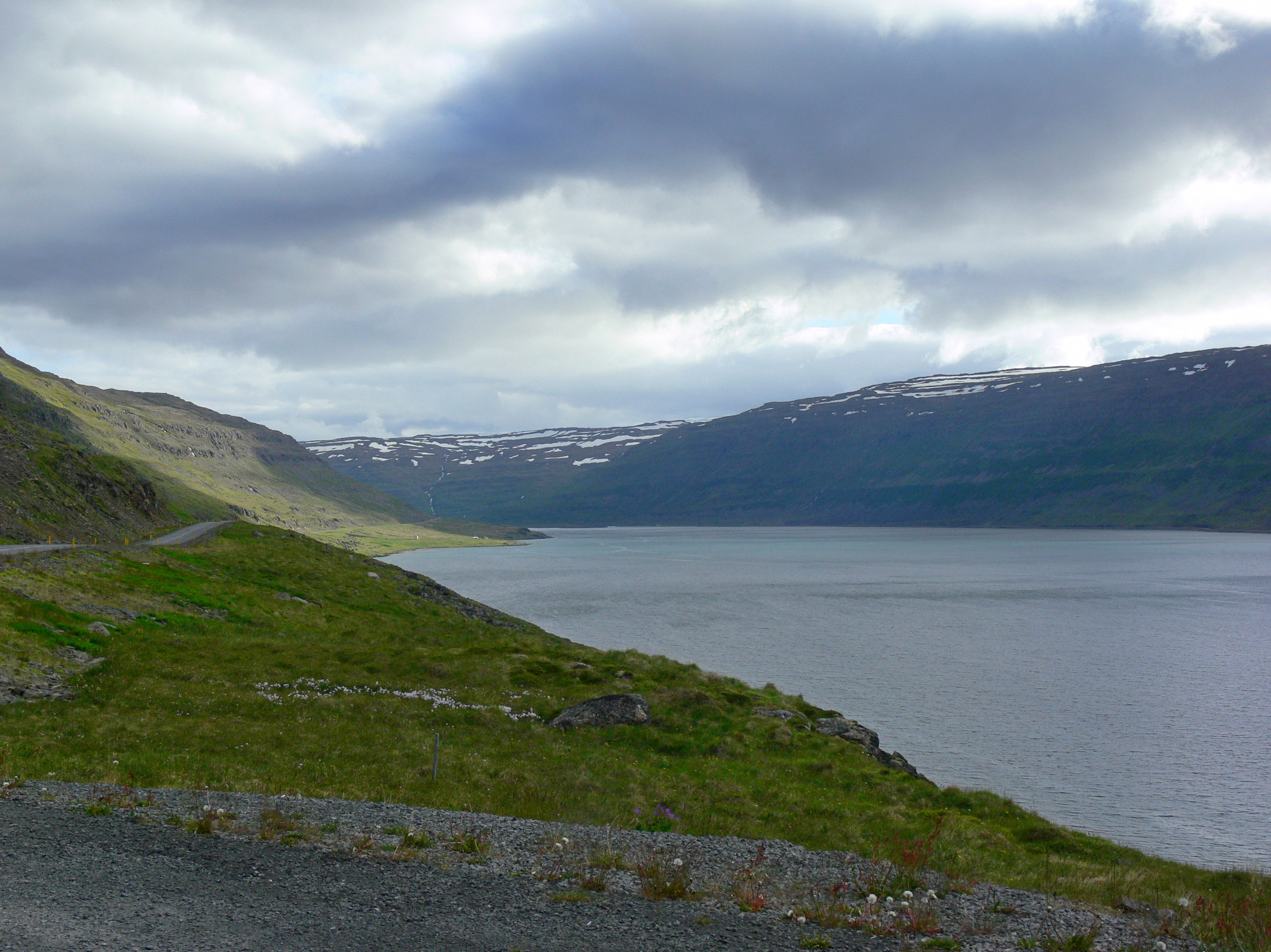 Skötufjörður, ein Seitenarm des Ísafjarðardjúp.